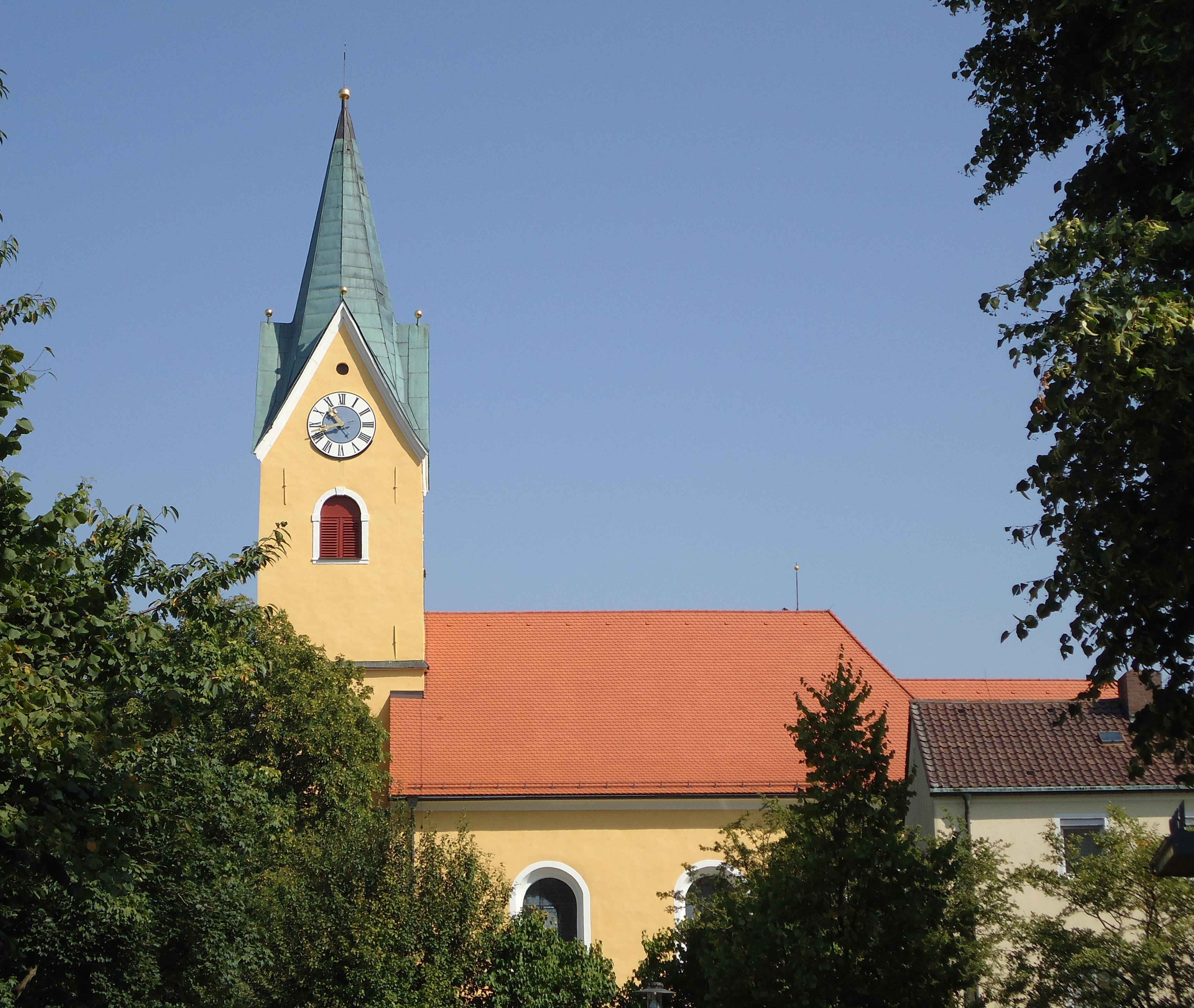 Kirche St. Martin in Mähring-Griesbach